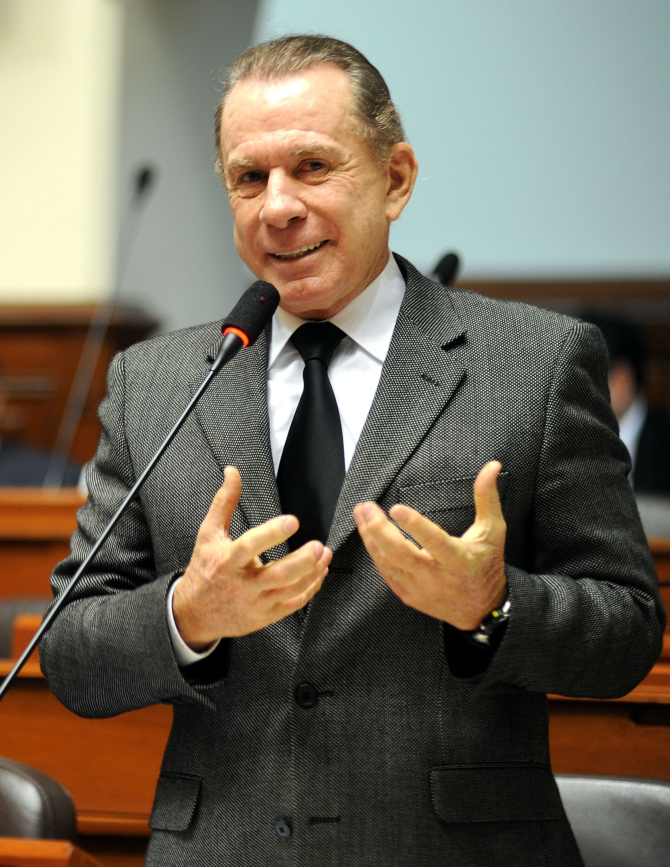 El legislador Ricardo Belmont fija su posición en el debate parlamentario realizado esta tarde por el Pleno.